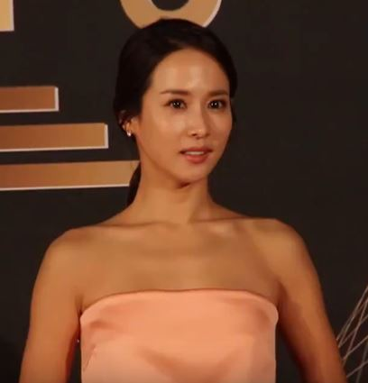 2017년 마지막 날인 12월 31일 오후 서울 영등포 여의도 KBS홀 야외광장에서 '2017 KBS 연기대상' 레드카펫 행사가 열렸다.